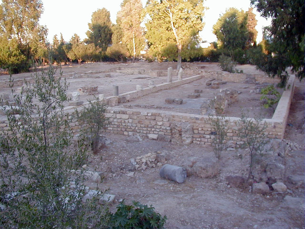 quartier paleochretien de Carthage 1